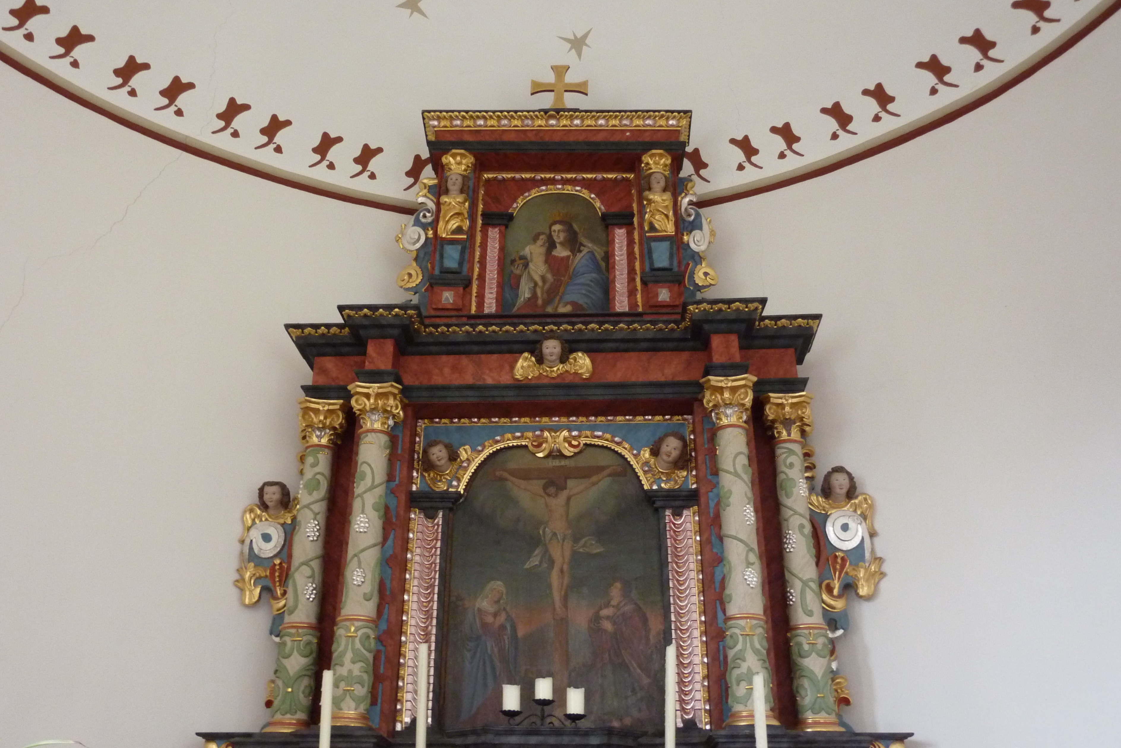 barocker Altar in der katholischen Kirche St. Rochus in Rodder